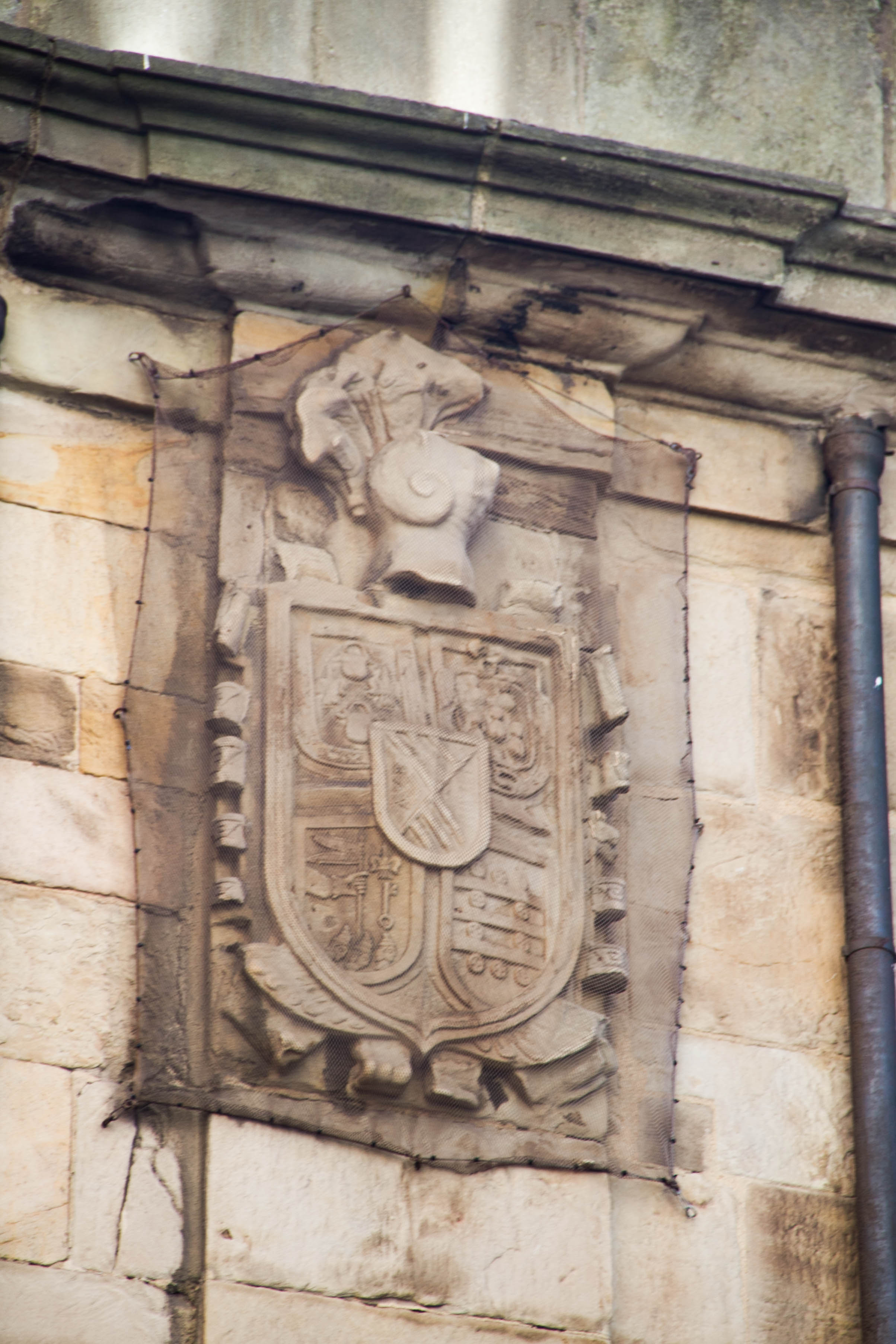 Escudo del Palacio de Jove Huergo